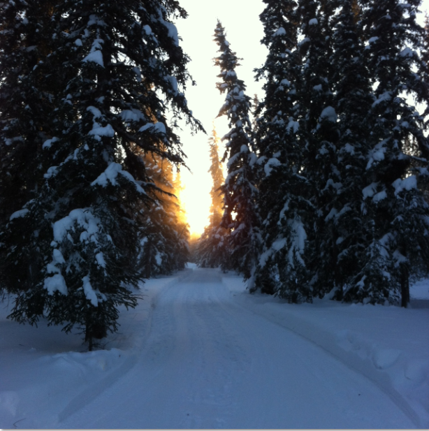 Tá an geimhreadh sneachtúil sa chrios intíre in Alasca.